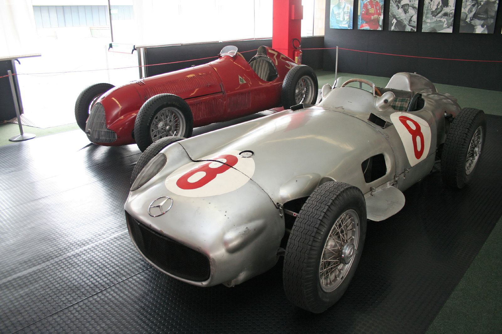 Mercedes Benz RW 196 del 1954 e Alfa Romeo Alfetta 159 Grand Prix del 1951